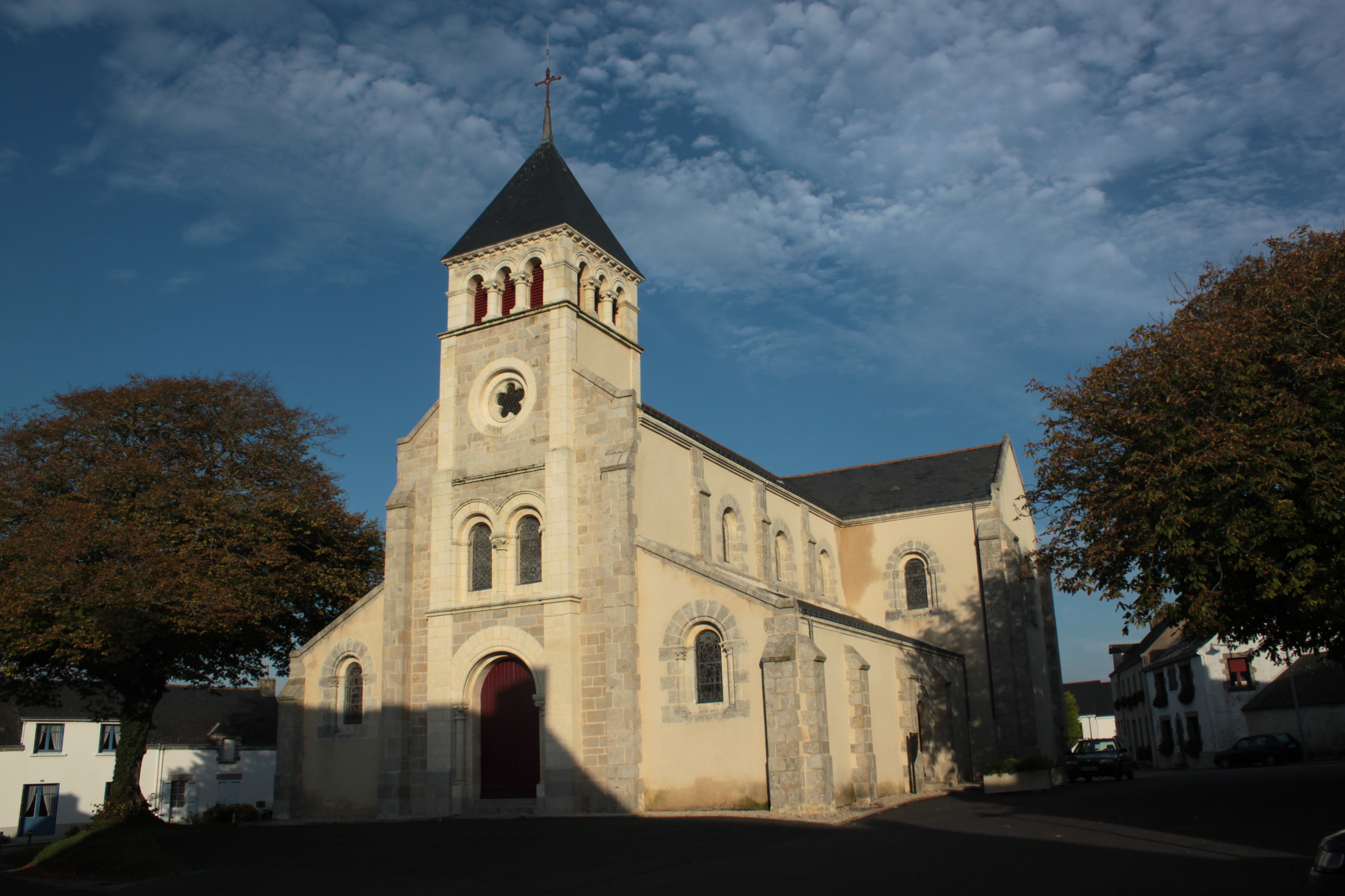 Église Saint-Molf, 1851, Saint-Molf.